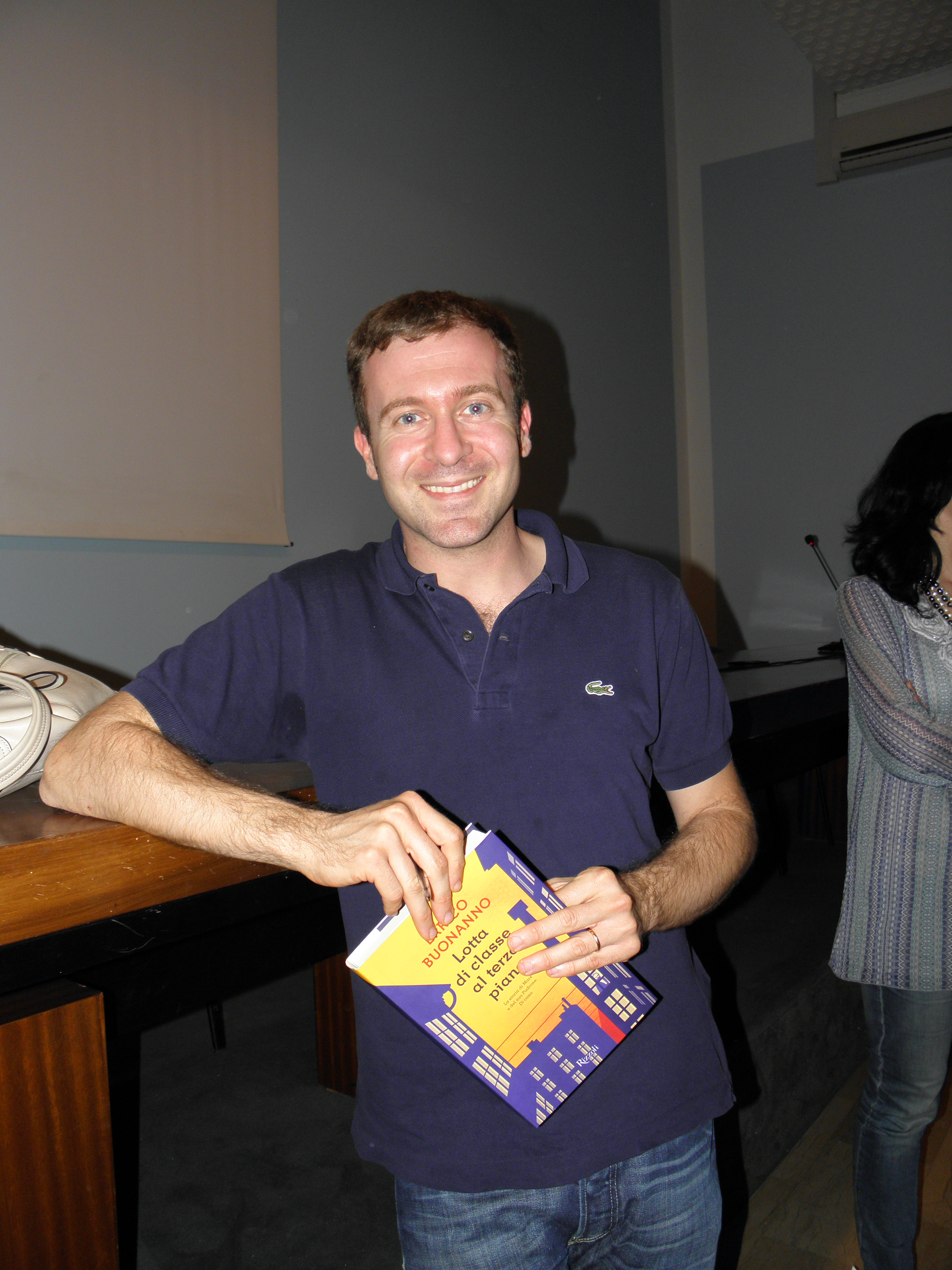 Errico Buonanno fotografato all'interno della sala della Gran Guardia a Rovigo in occasione della presentazione del suo romanzo Lotta di classe al terzo piano.